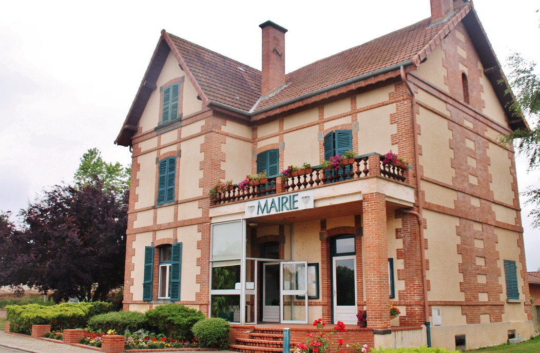 La Mairie